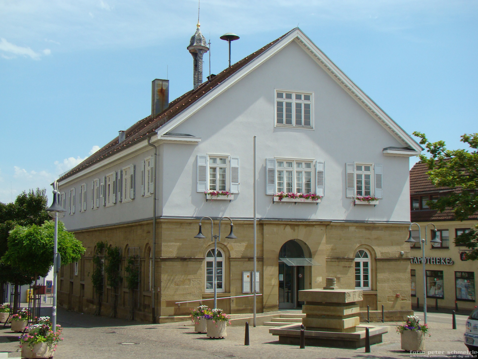 Obersulm-Wilsbach, Rathaus